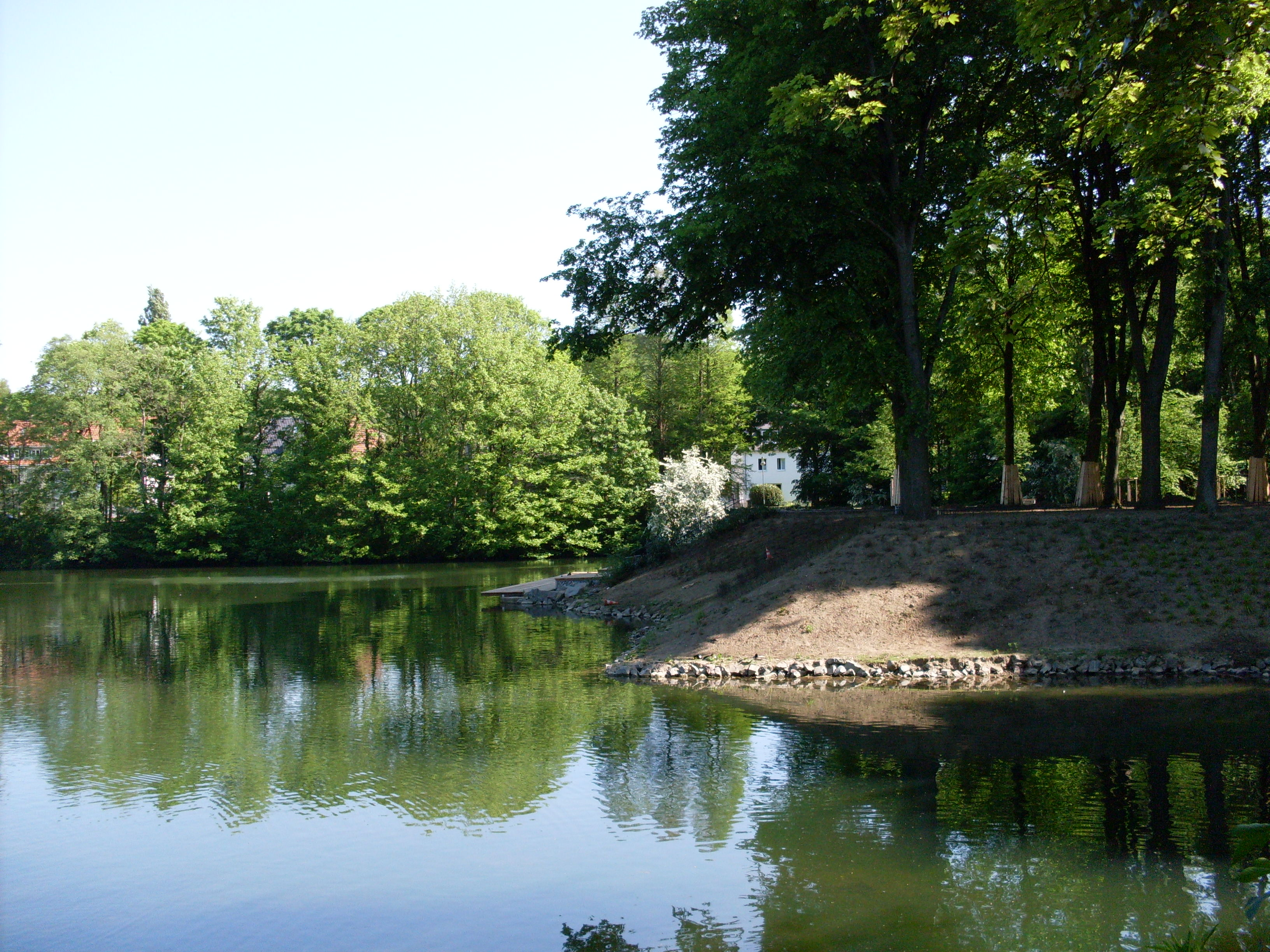 Düsseldorf-Grafenberg Ostpark